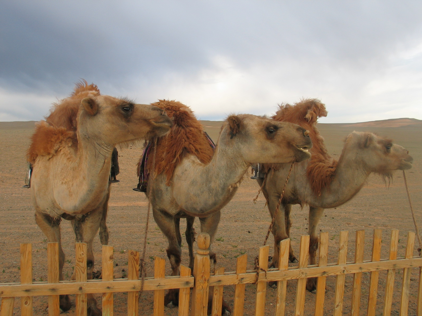 Drei Kamele in der Mongolei